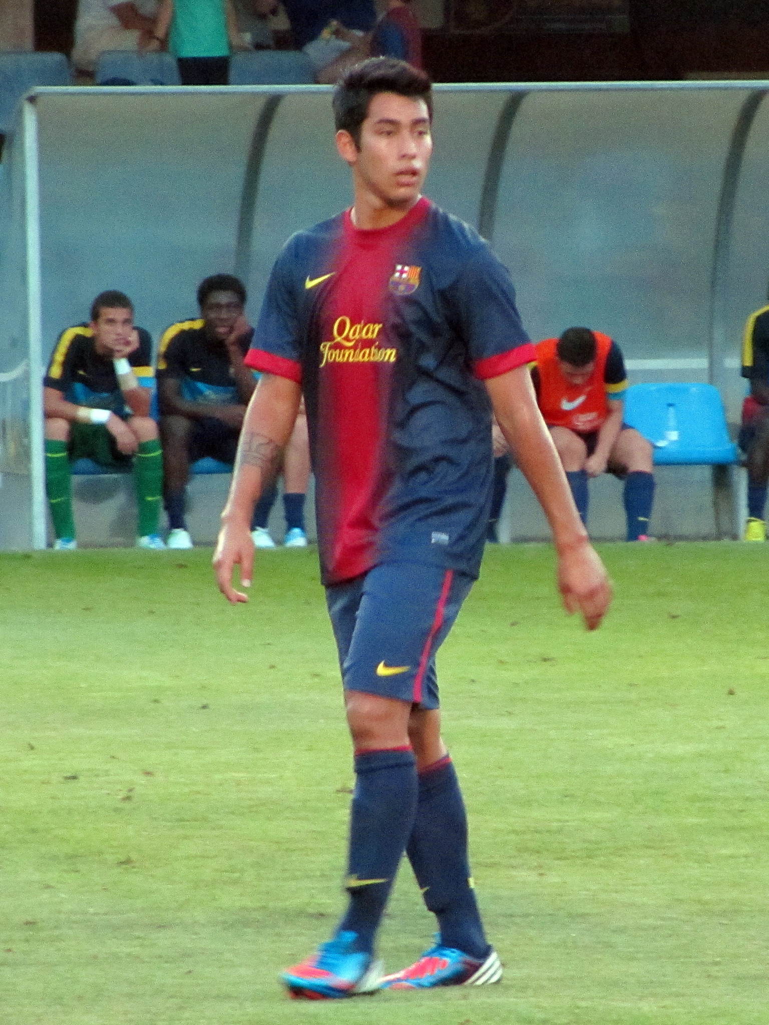 Barcelona B player Sergio Araujo in a 2012-13 home kit. Foto realizada por Javier Segura (@castroquini)